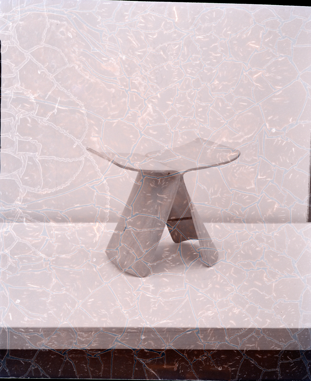 Servizio fotografico : Milano, 1957 / Paolo Monti. - Buste: 3, Fototipi: 3 : Negativo b/n, gelatina bromuro d'argento/ pellicola ; 10x12. - ((Serie costituita da 3 negativi identificati con i nn.: 21426-21428. La suddetta serie è contenuta nella scatola identificata con la numerazione 21348-21443. Sulla scatola manoscritto con pennarello nero: "XI T - 1957/ 2101-2200". La scatola è a sua volta contenuta in una scatola grande col coperchio giallo. - Occasione: Documentazione della XI Triennale del 1957, intitolata "Eclettismo-formalismo: Esposizione internazionale delle arti decorative e industriali moderne e dell'architettura moderna". L'esposizione si tenne presso il Palazzo dell'Arte.